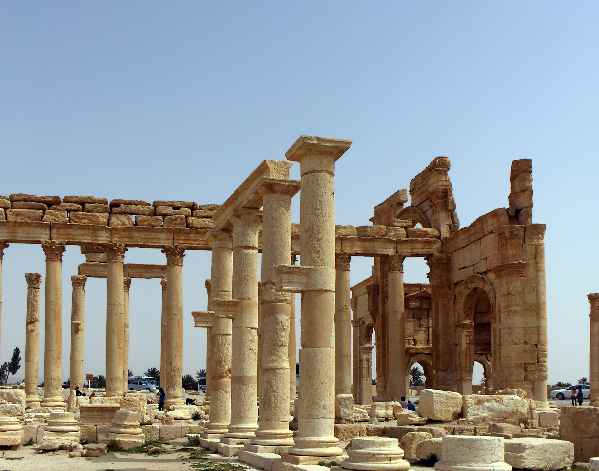 Colonnato del santuario e tempio di Nabu di Palmira